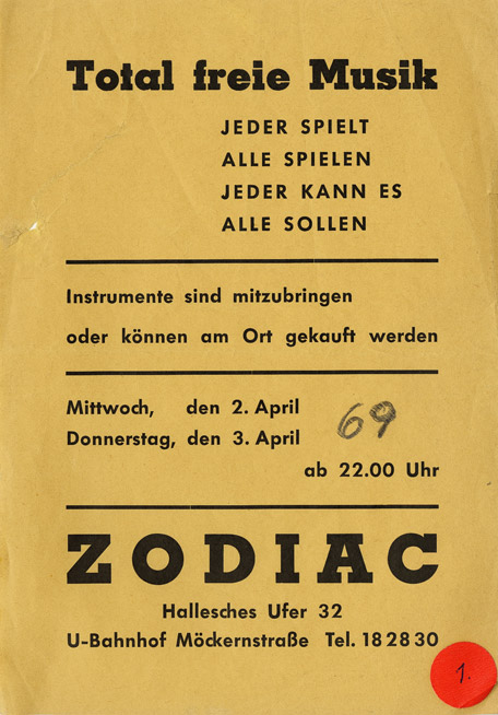 Eruption Konzerteinladung 1969